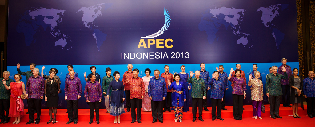 Reunión de Líderes Económicos de APEC 2013. Bali, Indonesia, 08 de octubre de 2013.